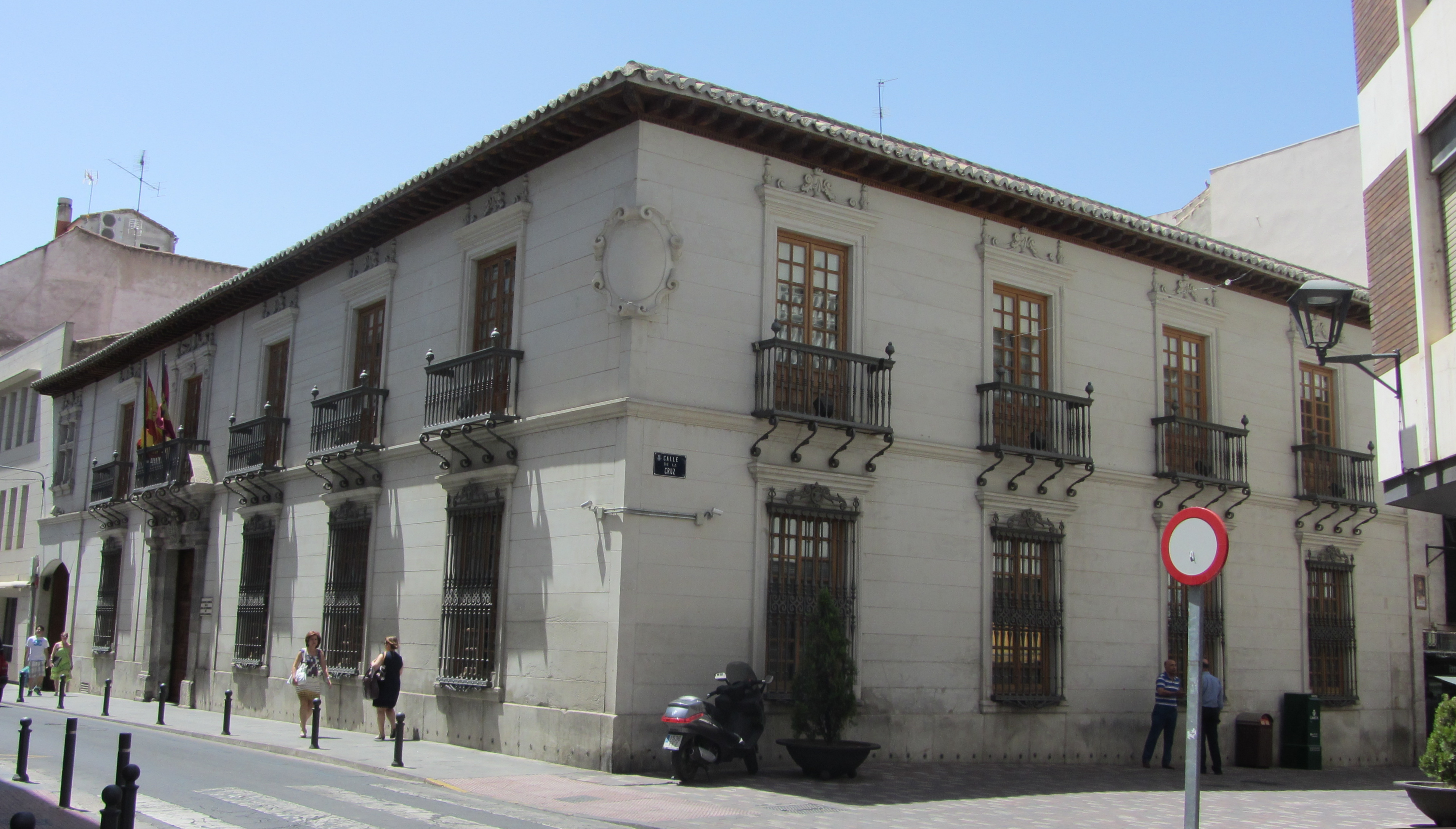 Palacio de Medrano situado en la calle Paloma, nº 9, en Ciudad Real (España). Edificio de estilo neorrenacentista, levantado en el siglo XIX sobre el palacio del Marqués de Treviño. También conocido como «casa de las cabezas», por las tres cabezas de moro del escudo nobiliario de los Treviño, que destaca en su portada del siglo XVI. Tiene un elegante patio columnado. Hoy acoge la Delegación de la Junta de Comunidades de Castilla-La Mancha.